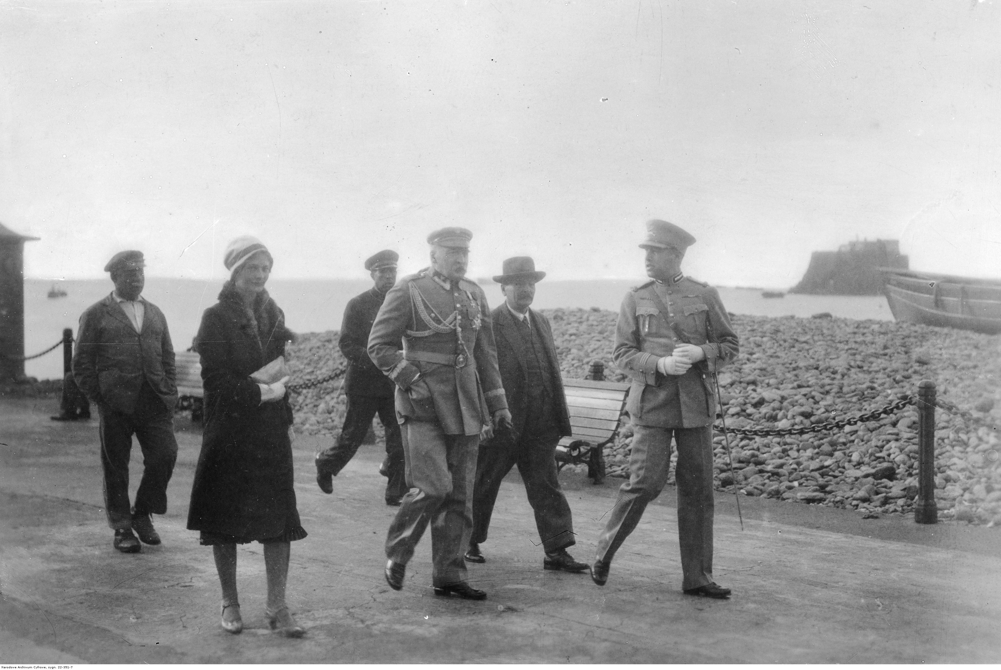 Marszałek Józef Piłsudski w towarzystwie dr. płk. Marcina Woyczyńskiego (2. z prawej) i dr. Eugenii Lewickiej zwiedza okolice Funchal.